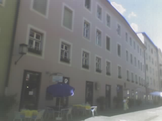 Das Bild zeigt die Bezirkshauptmannschaft des Bezirks Schwaz.